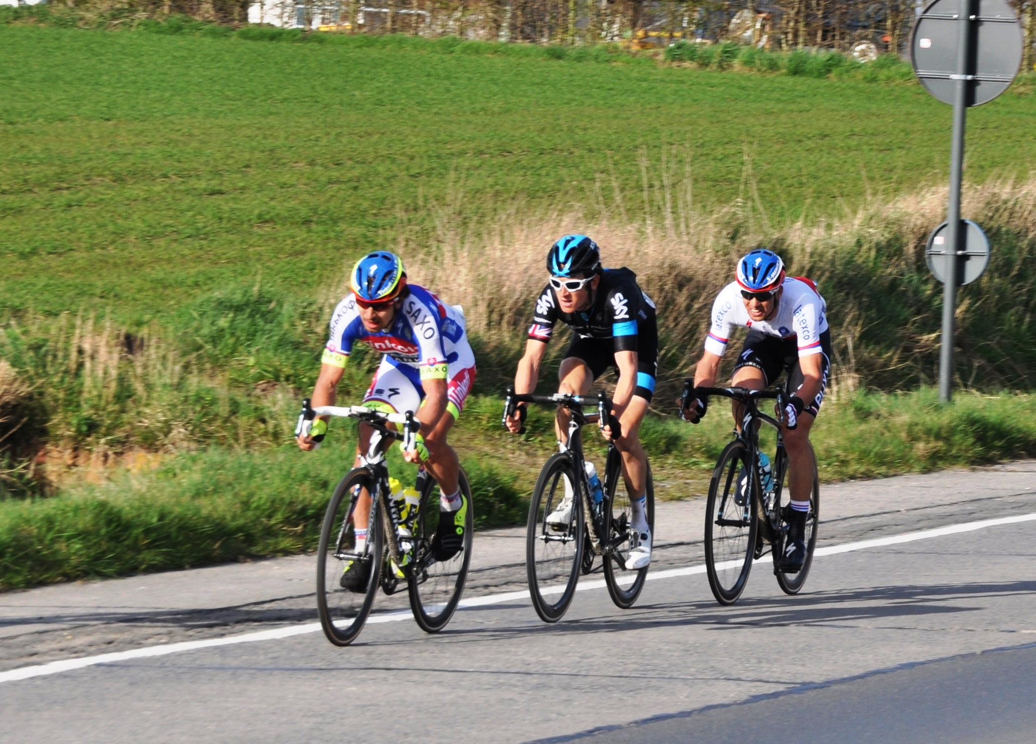 Sagan, Thomas, et Stybar, sur la dernière échappée de l'E3 2015